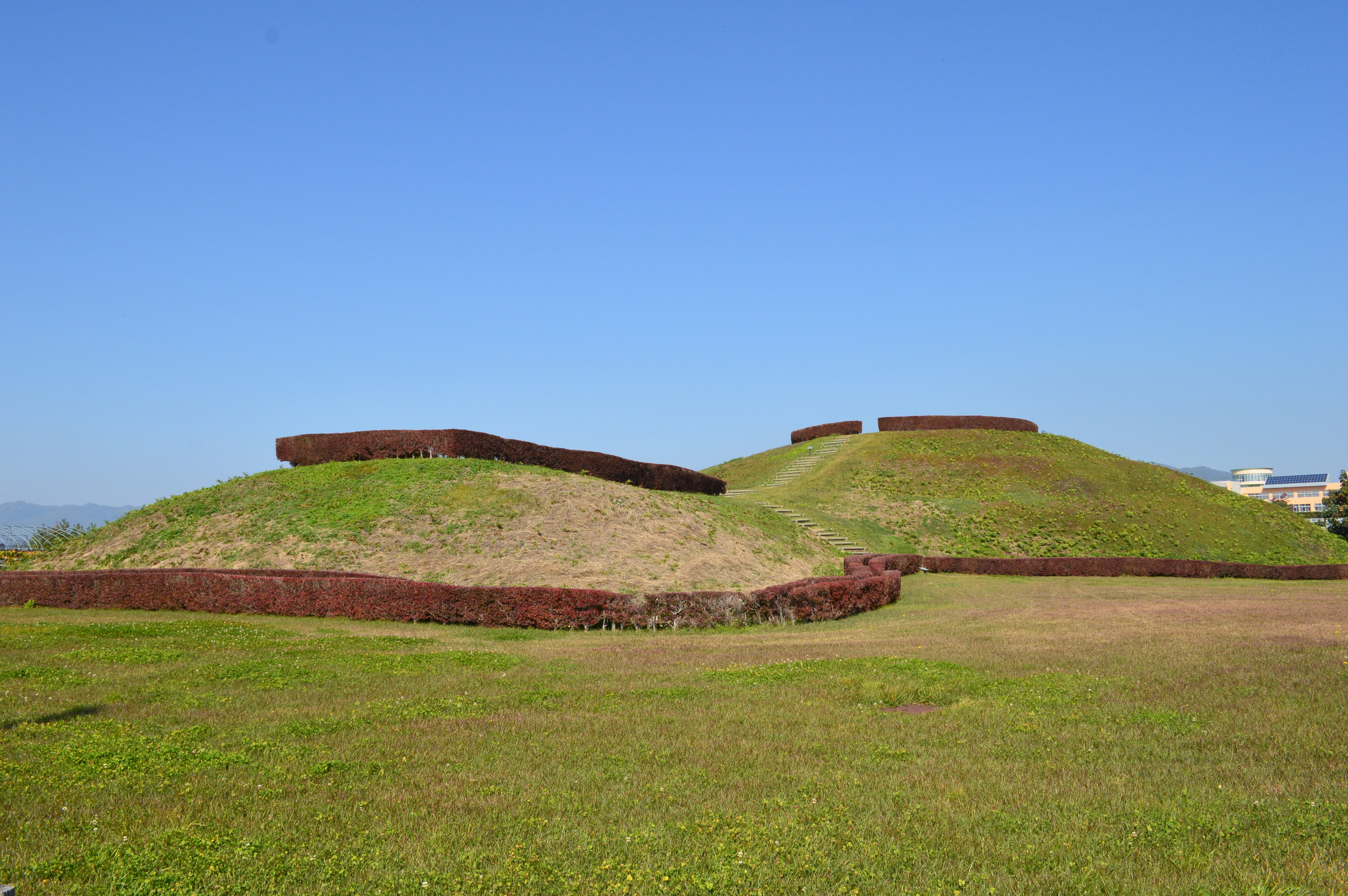 稲荷森古墳 全景